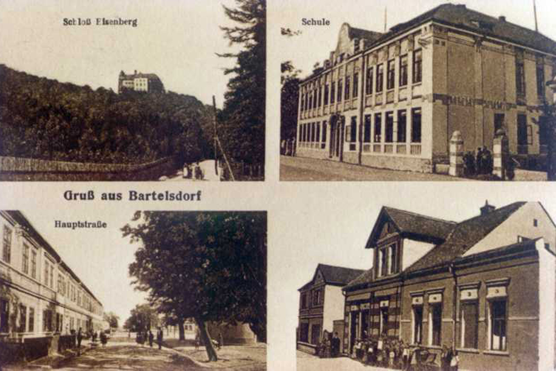 Ehemaliges Dorf Dřínov (Bartelsdorf) nei Most (Brüx) in Tschechien.